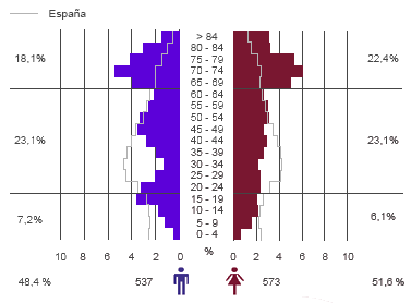 Estructura de la población de Castilblanco